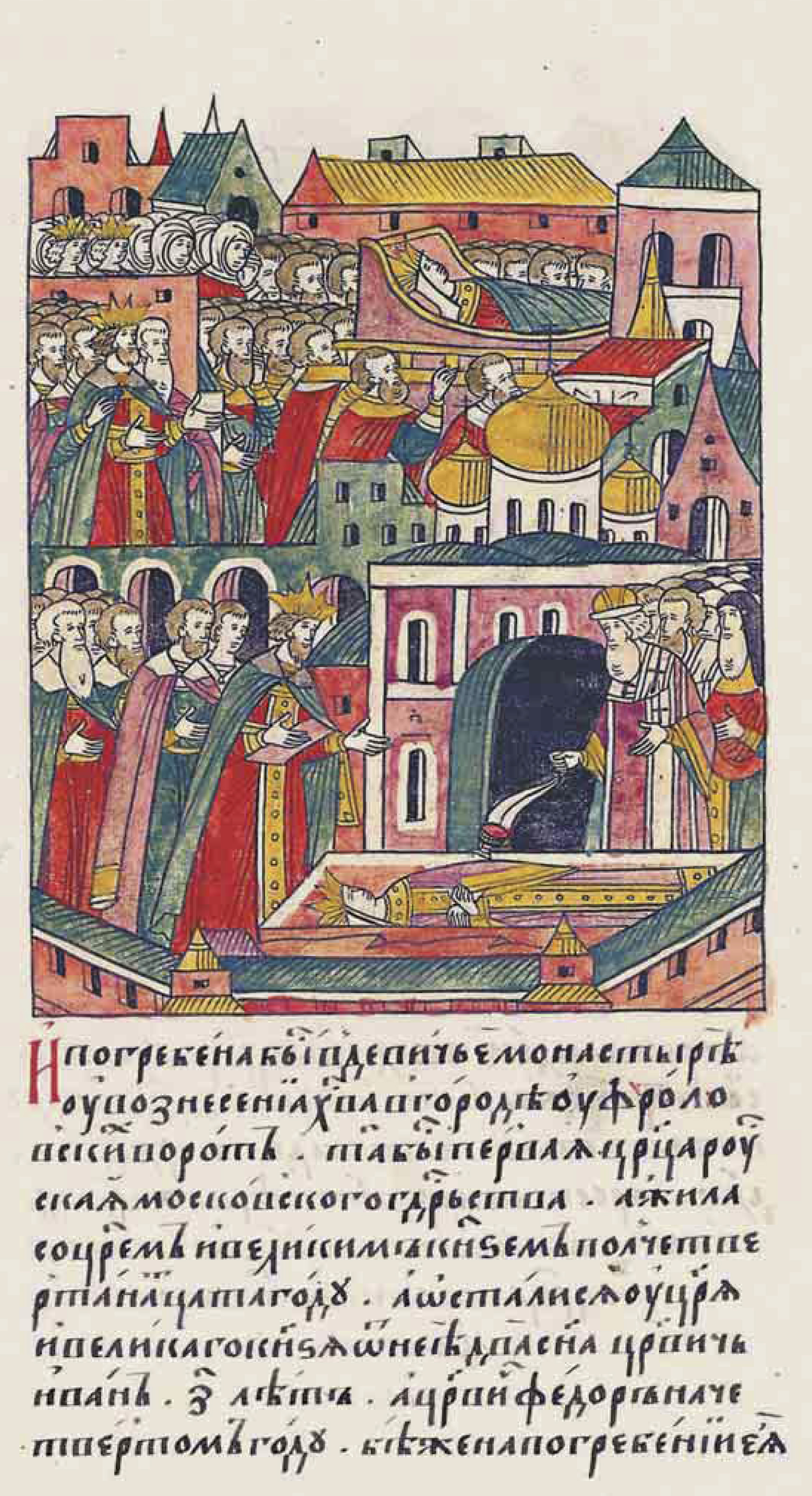 огребение царицы Анастасии в 1560 г. Миниатюра Лицевого летописного свода XVI в. И погребена была в Девичьем монастыре у Вознесения Христова в Кремле, у Фроловских ворот. Она была первая царица Руская Московского государства, а жила с царем и великим князем тринадцать с половиной лет, и остались у царя и великого князя от нее два сына: царевич Иван семи лет и царевич Феодор четырех лет. Были же на погребении ее [Макарий, митрополит всея Руси, и Матфей, епископ Крутицский, и архимандриты, и игумены, и весь освященный собор, с царем и великим князем были брат его князь Юрий Васильевич и князь Владимир Андреевич, и царь Александр Сафа-Киреевич, бояре и вельможи. И не только множество народа, но и все нищие и убогие со всего города пришли на погребение, не для милостыни, но с плачем и рыданием великим провожали ее; и от множества народа на улицах едва могли тело ее отнести в монастырь. Царь и великого князя от великого стенания и от жалости сердца едва под руки вели.]